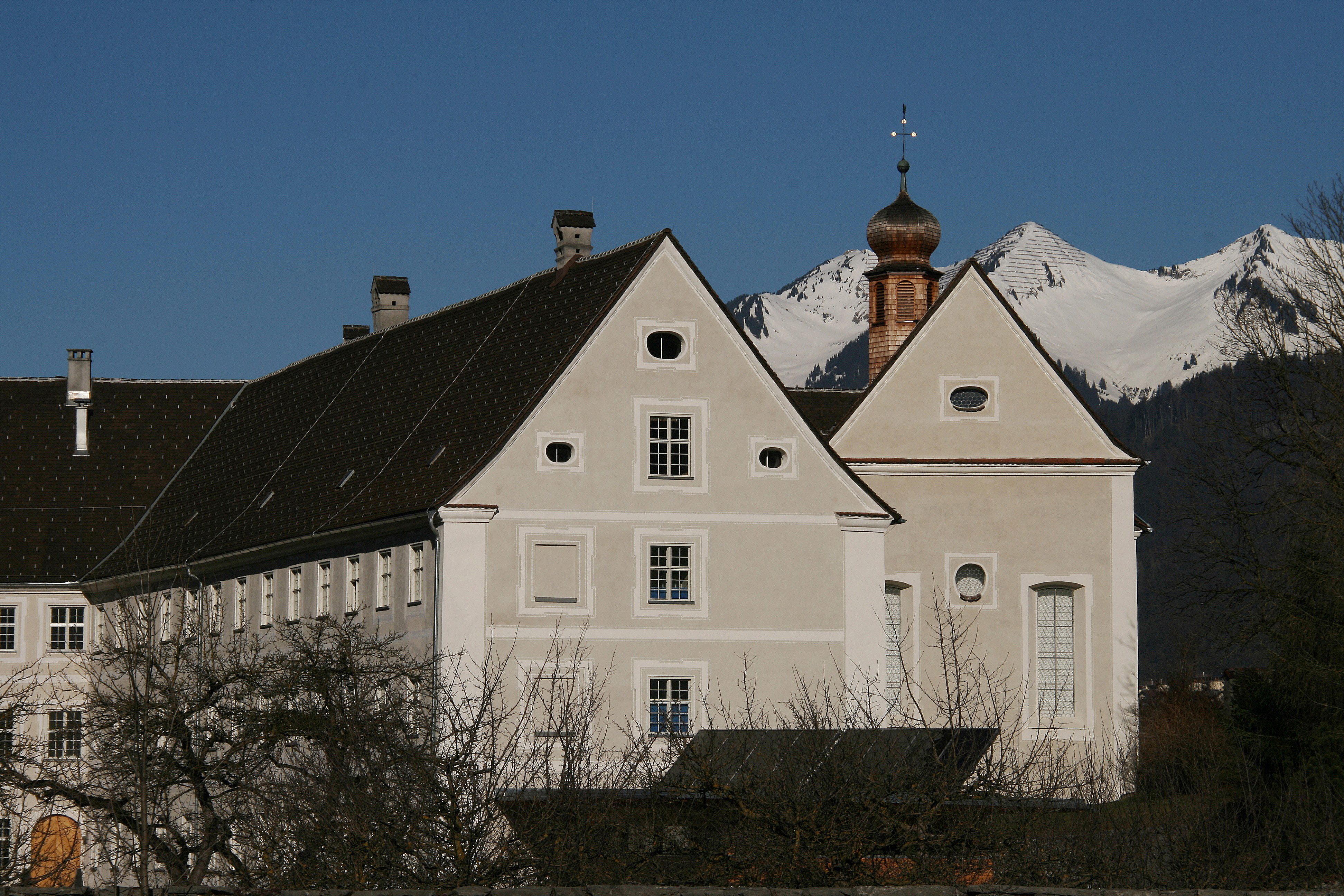 Dominikanerinnenkloster St. Peter in Bludenz, Vorarlberg